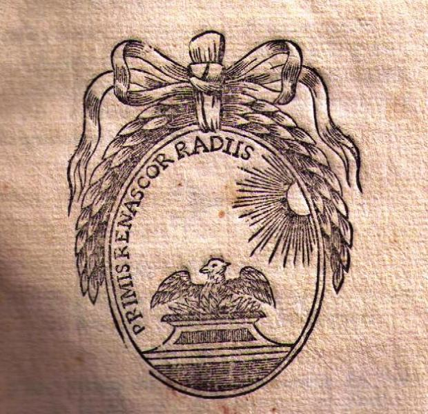 Emblème XVIIIe, datant de MDCCLXXIV : Académie des Sciences, Lettres et Arts de Marseille, « Aux premiers rayons [du soleil], je renais ».